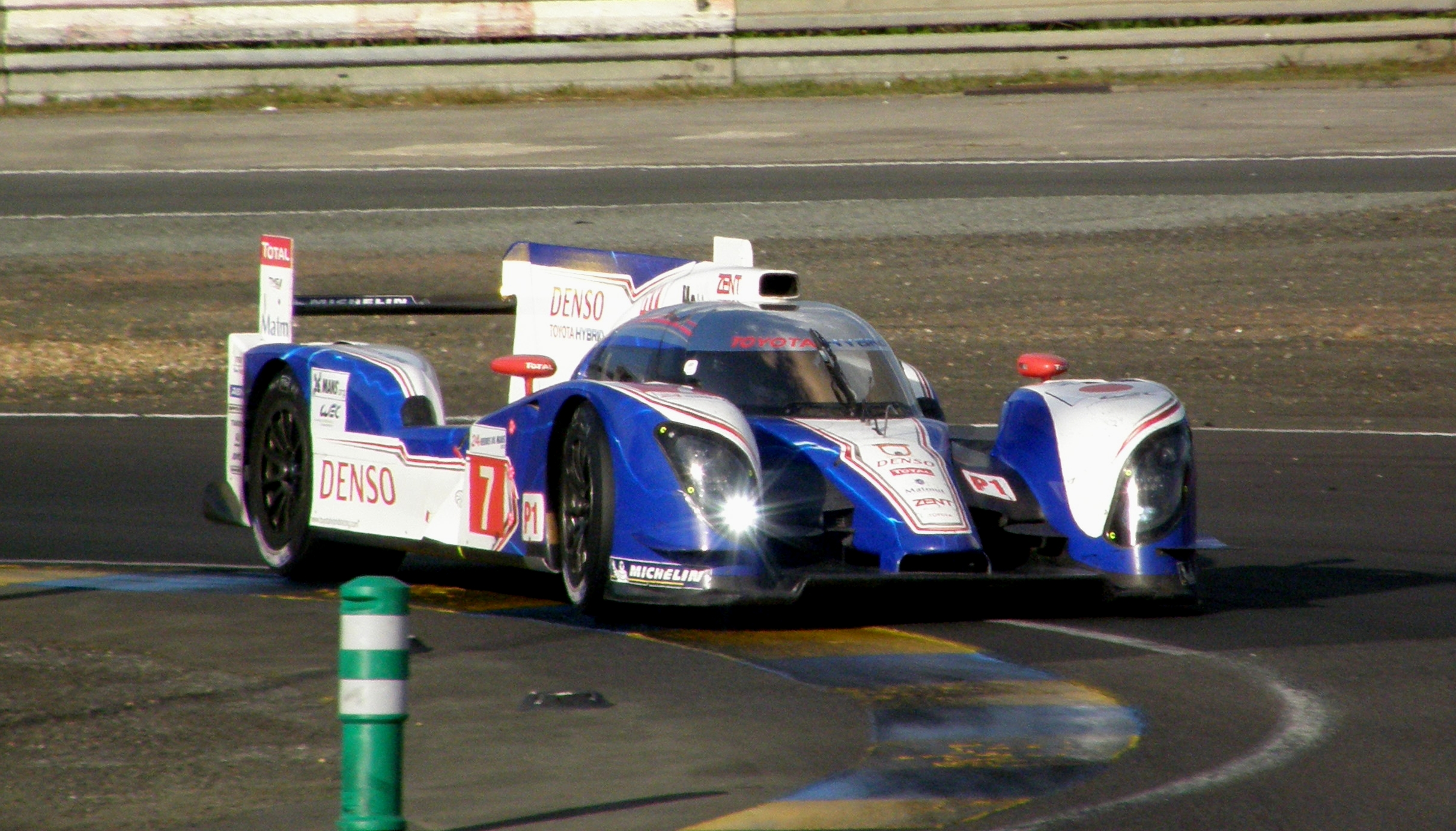 TOYOTA TS030 Hybrid au virage de Mulsanne au 24h du Mans 2012